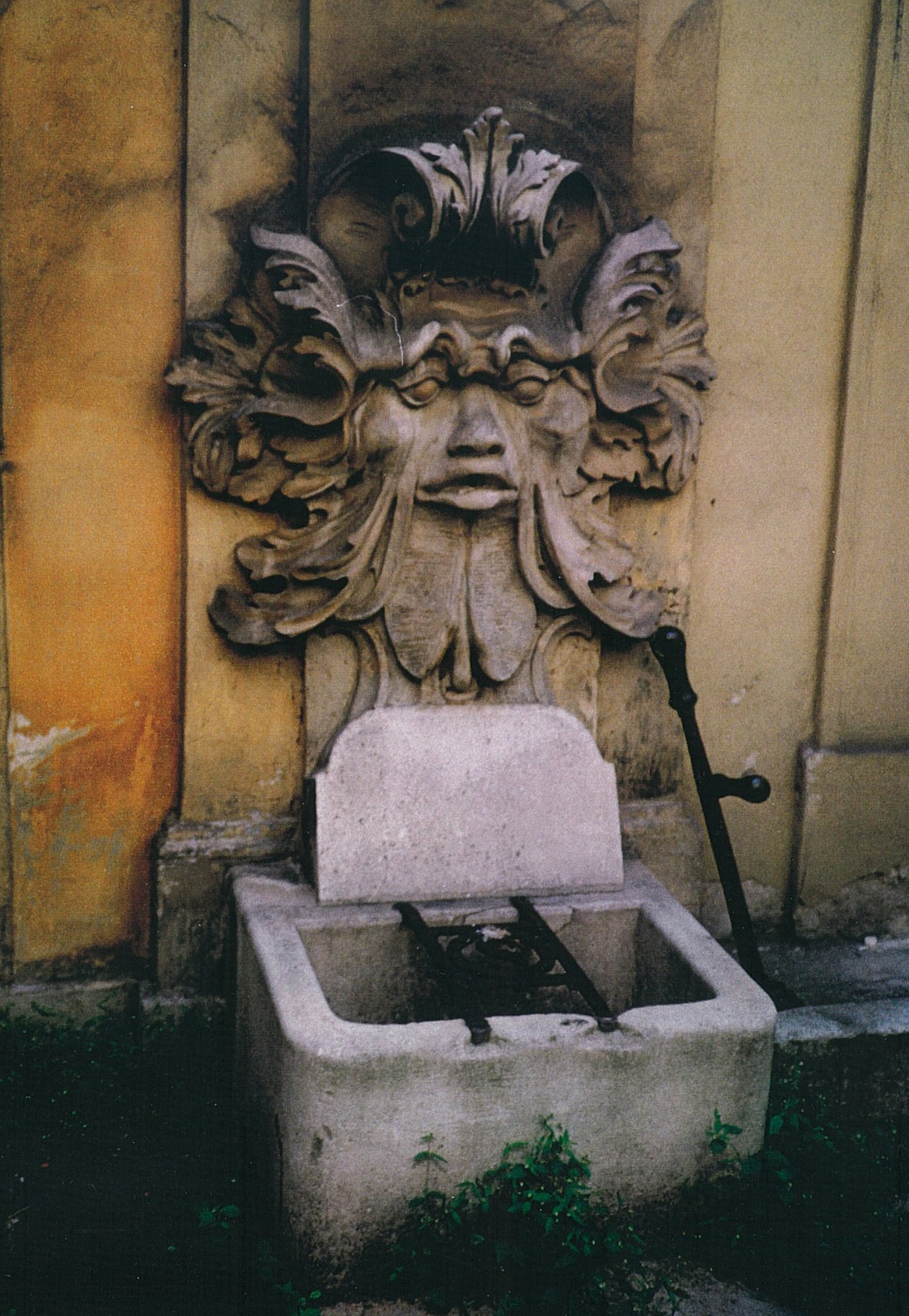 Palais_Kinsky_Hofbrunnen